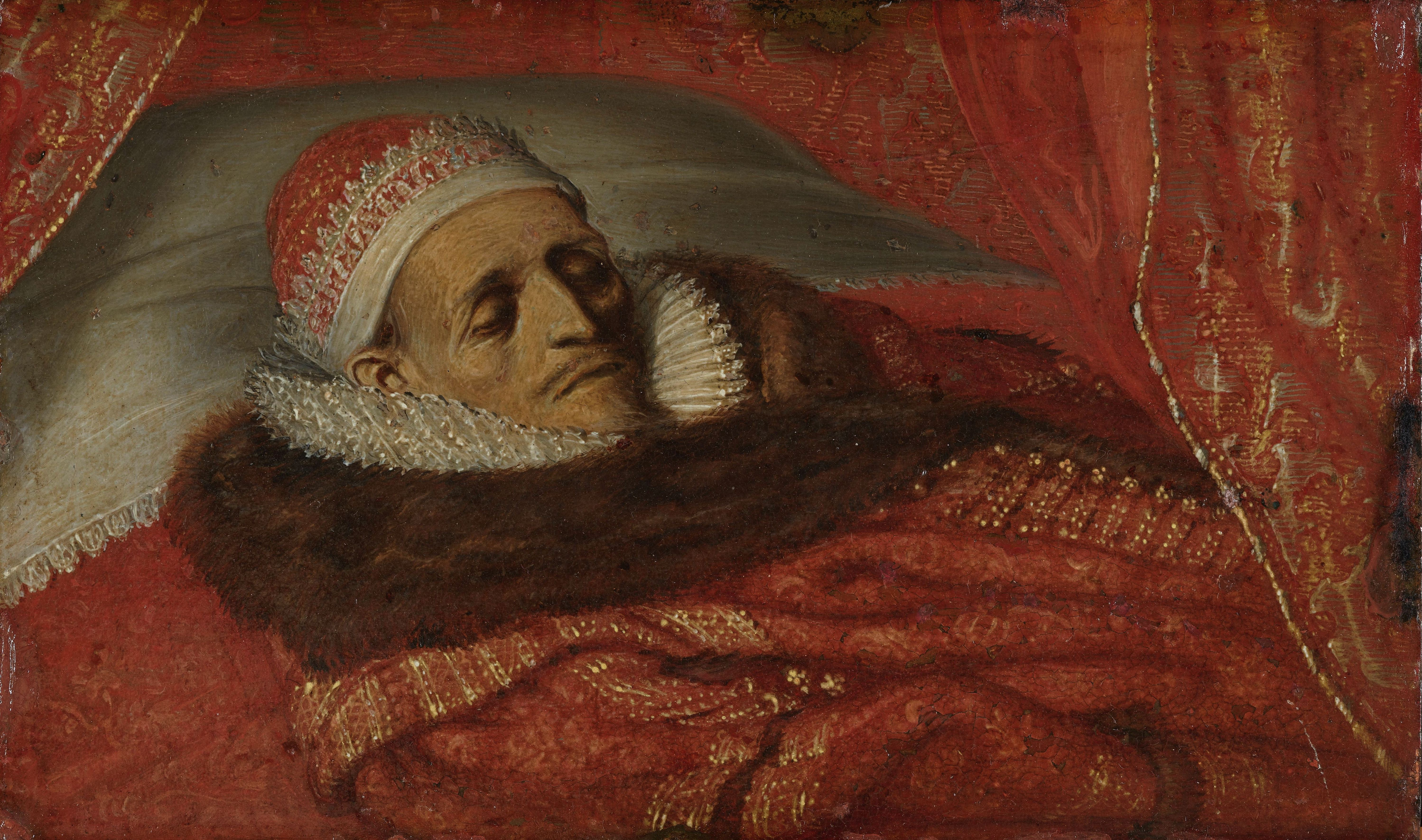 Maurits (1567-1625), prins van Oranje, op zijn praalbed, 1625. Het lichaam van de dode prins, ten halven lijve, liggend op een bed, op het hoofd een kanten muts.; Adriaen Pietersz van de Venne (ca. 1589–1662), olieverf op koper, ca. 1625